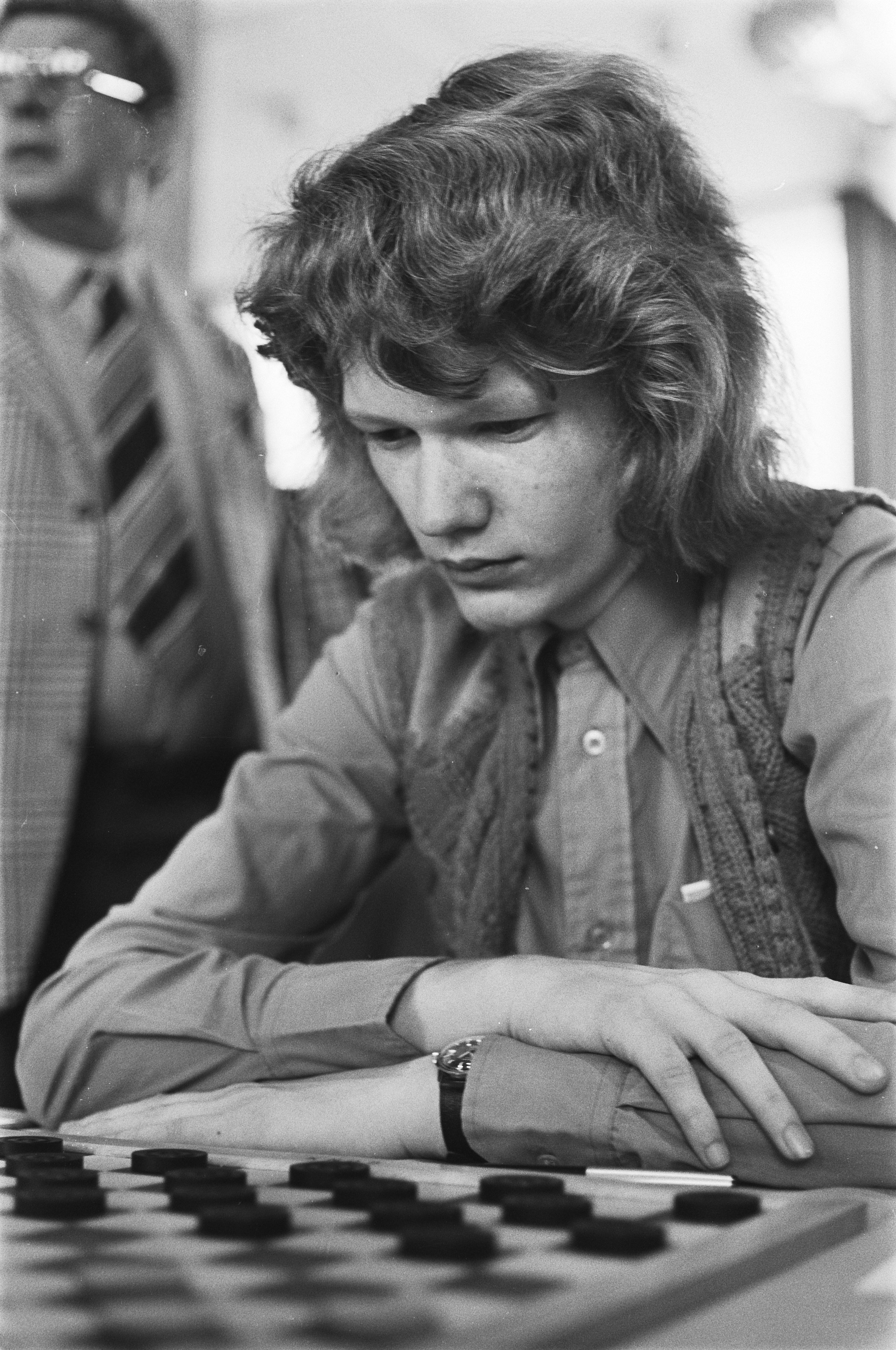 Wereldkampioenschappen Dammen, vijfde ronde, Jansen (Nederland)